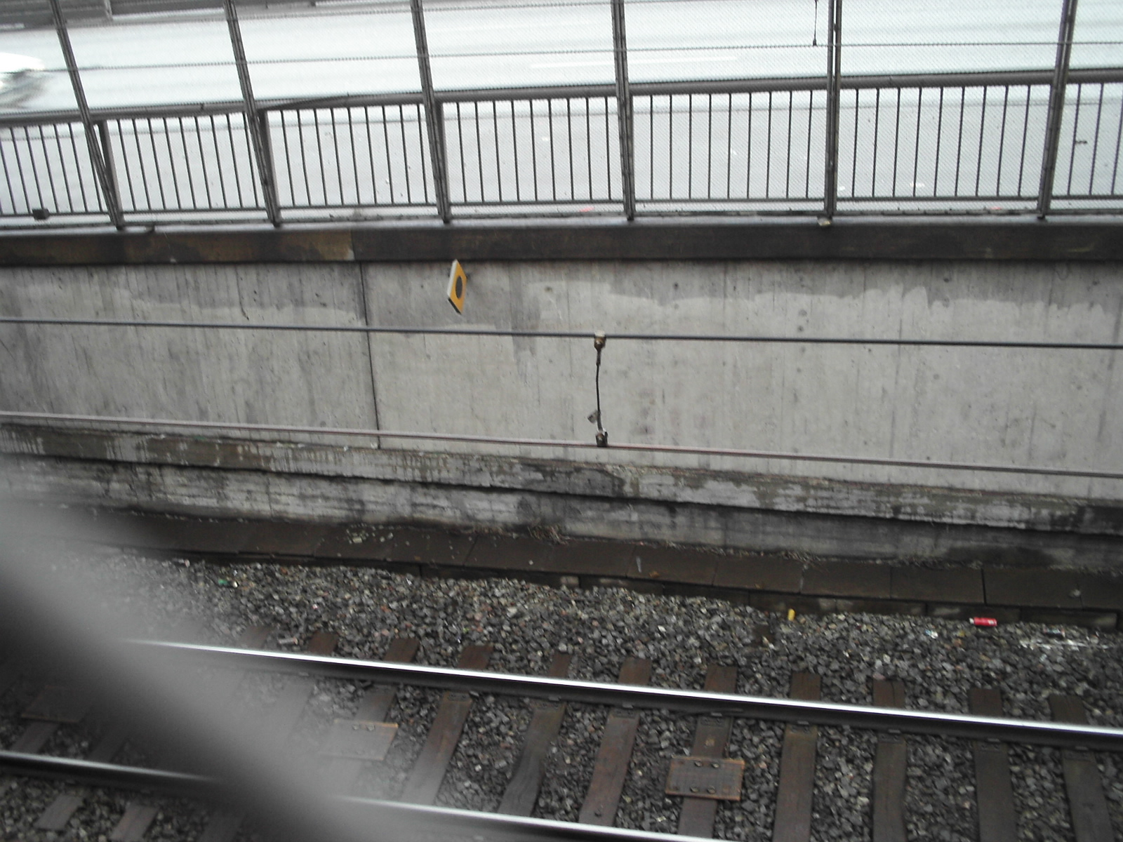 Bärtråd